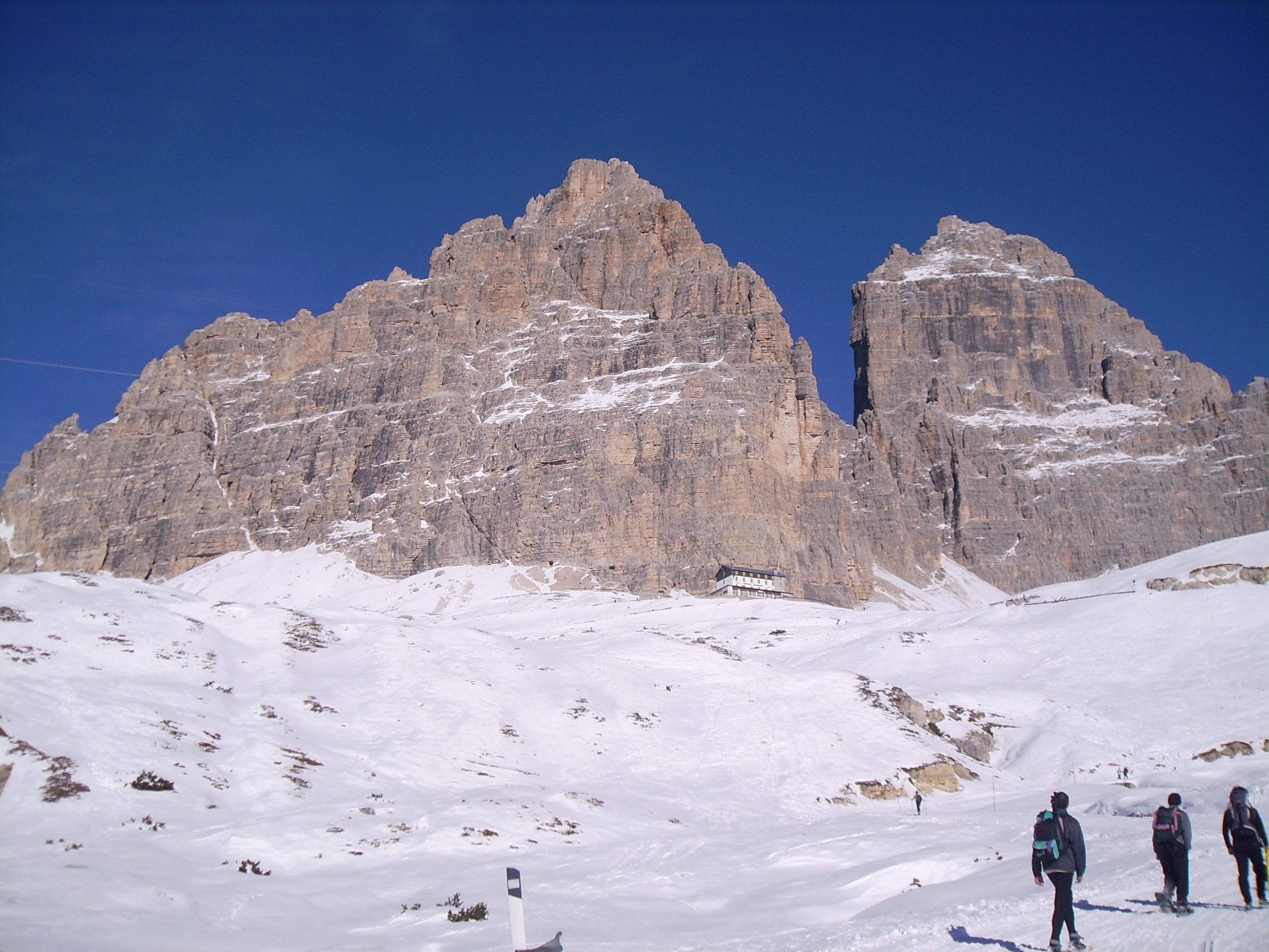 Auronzohütte (Rifugio Auronzo) vor den Drei Zinnen (Tre Cime di Lavaredo) in Auronzo di Cadore, Provinz Belluno, Venetien, Dolomiten, Italien. Links die westliche Zinne (Cima Ovest, 2973m) und rechts die Große Zinne (Cima Grande 2998m); Sicht von Süden.